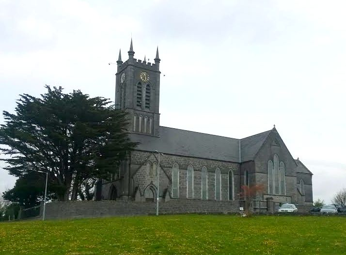 Irlandia, Ballinasloe, kościół pw św. Jana Ewangelisty